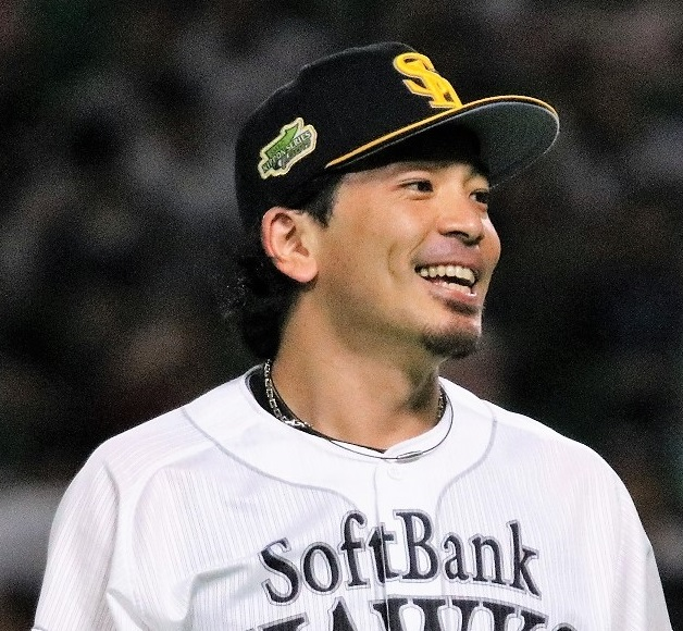 2017/10/30日本シリーズ第二戦にて